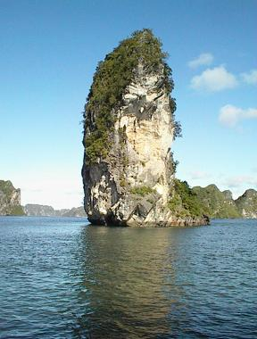 Description: Baie d'Along - Un rocher entre ciel et terre.